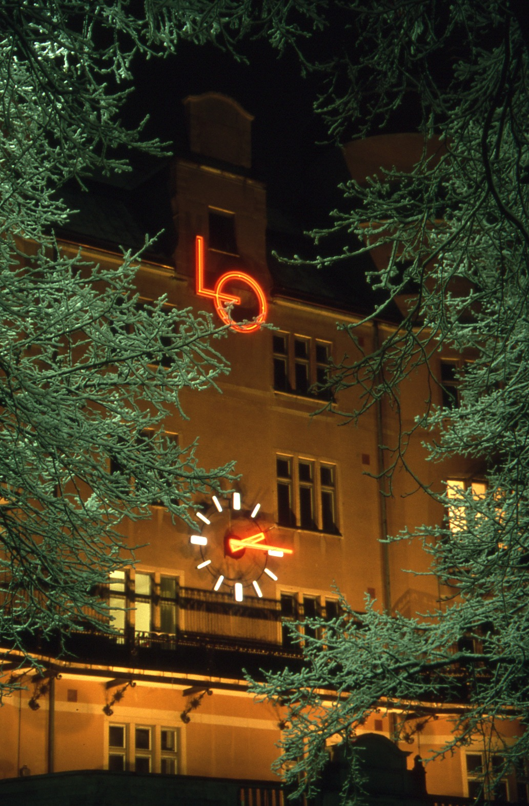 Lo-borgen i Stockholm